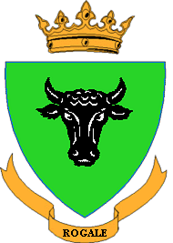 Rogale